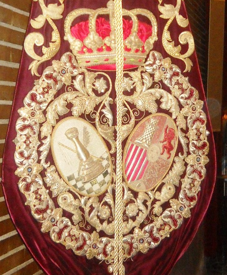 Escudo que aparece en el bacalao de la Hermandad